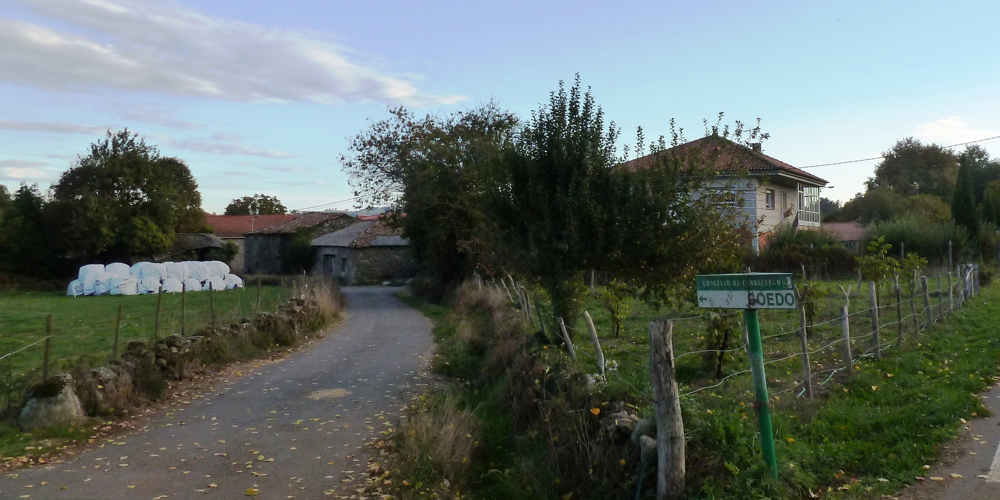 O Coedo, Buciños, Carballedo